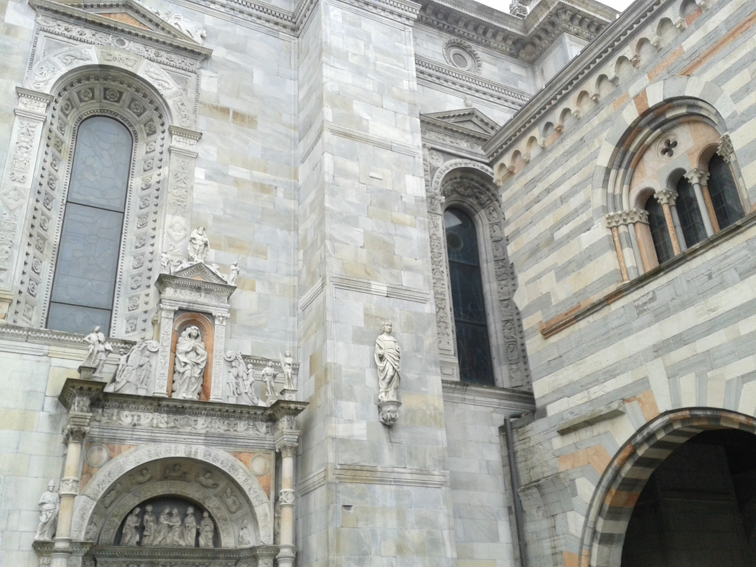 Nahtstelle zwischen Dom und Broletto, rückwärtige Ansicht (Teilabriß Broletto)